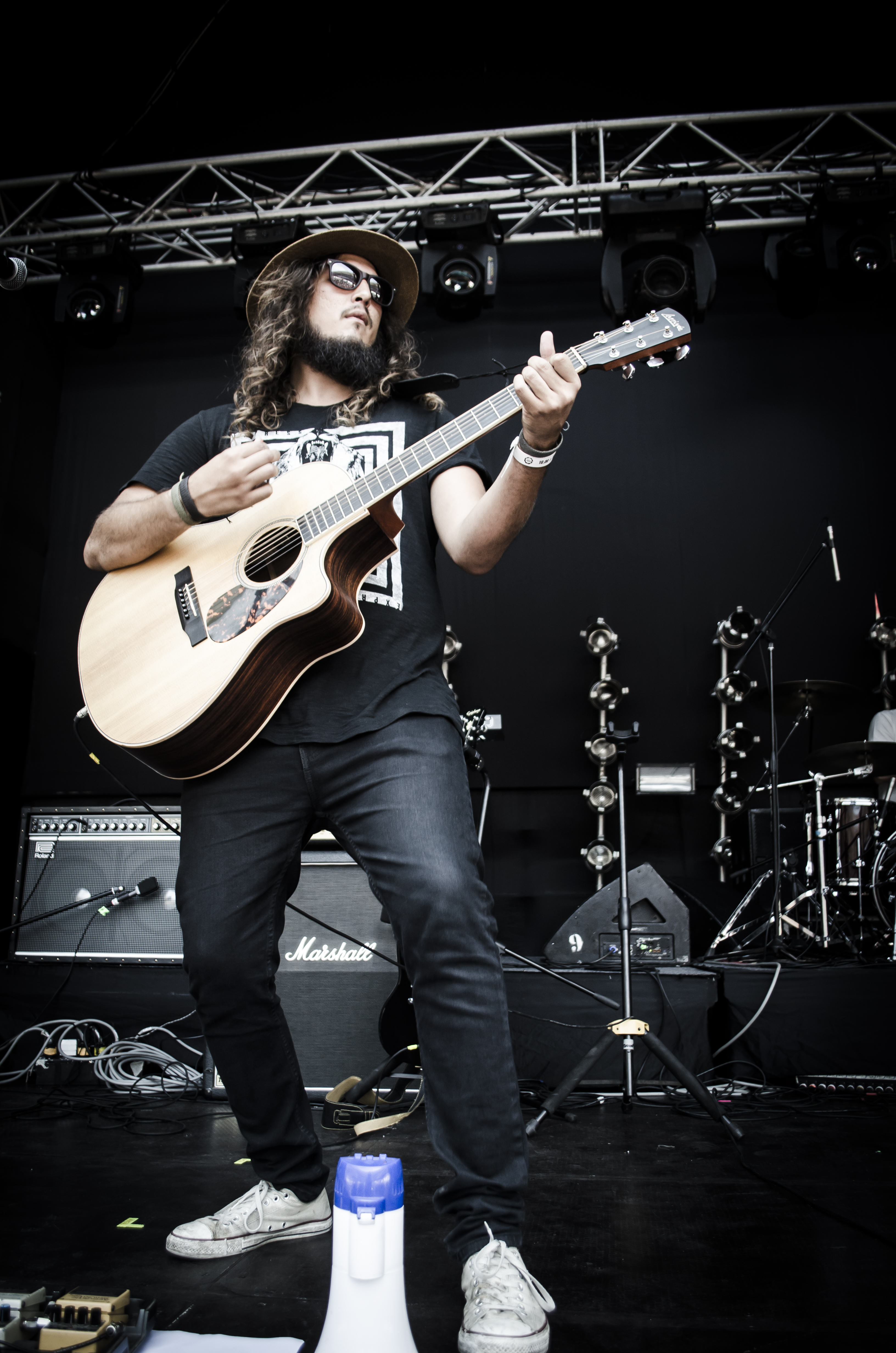 Gonzalo Calmet en concierto en el Estadio Nacional de Lima junto a Cementerio Club